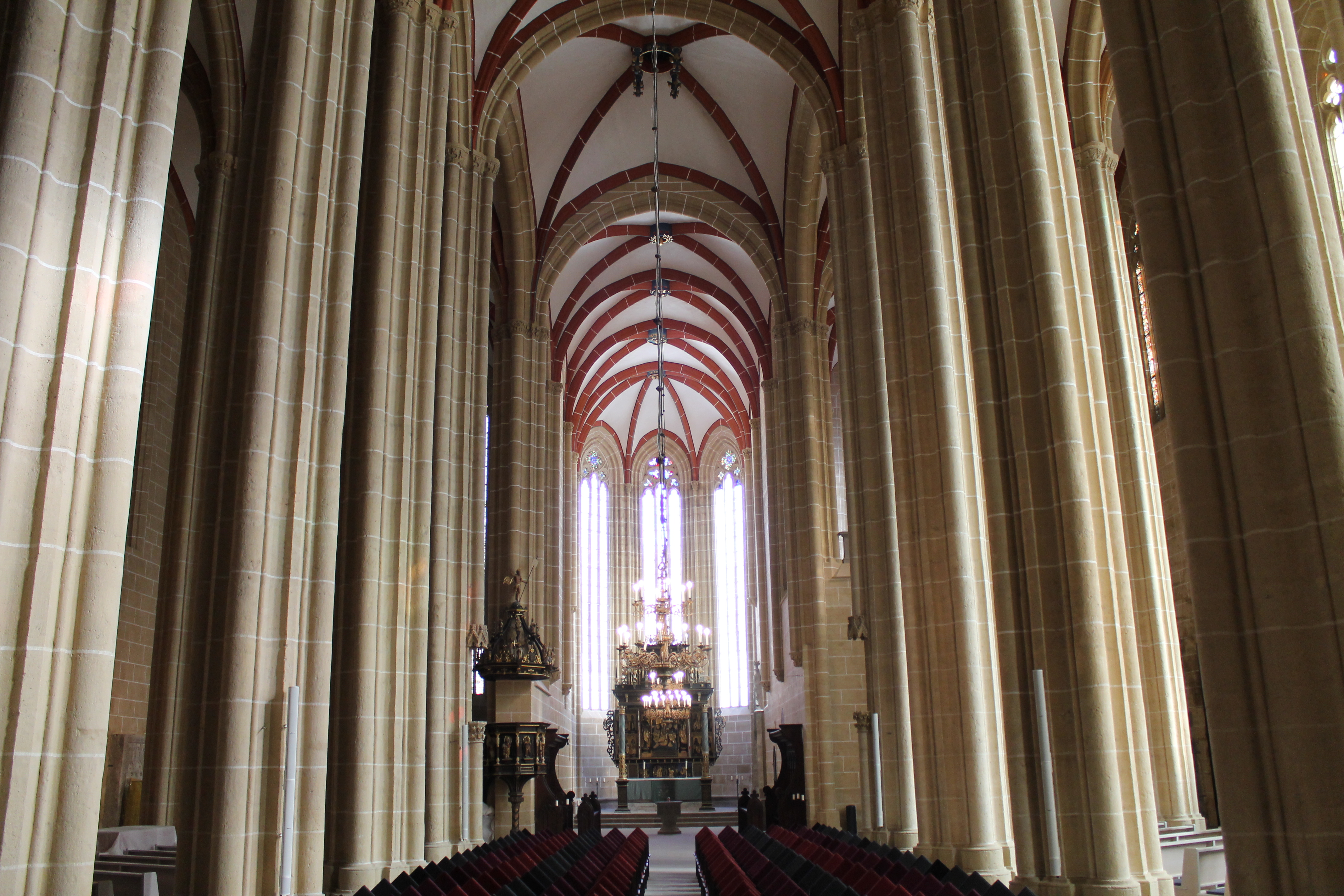 Der Innenraum der aus Sandstein bestehenden Kirche St. Marien